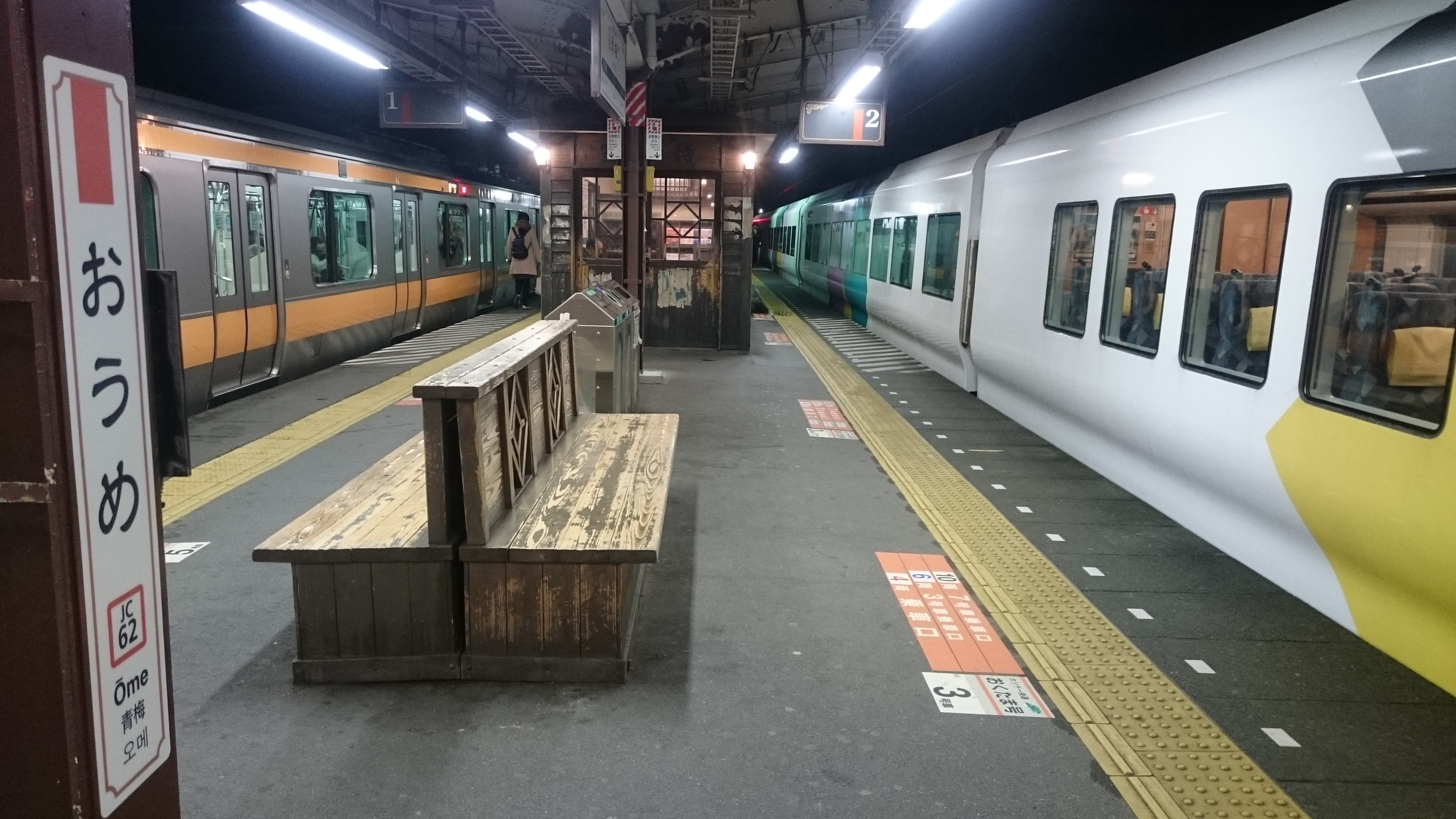 ome-liner-e257 at ome Station in 2018 December